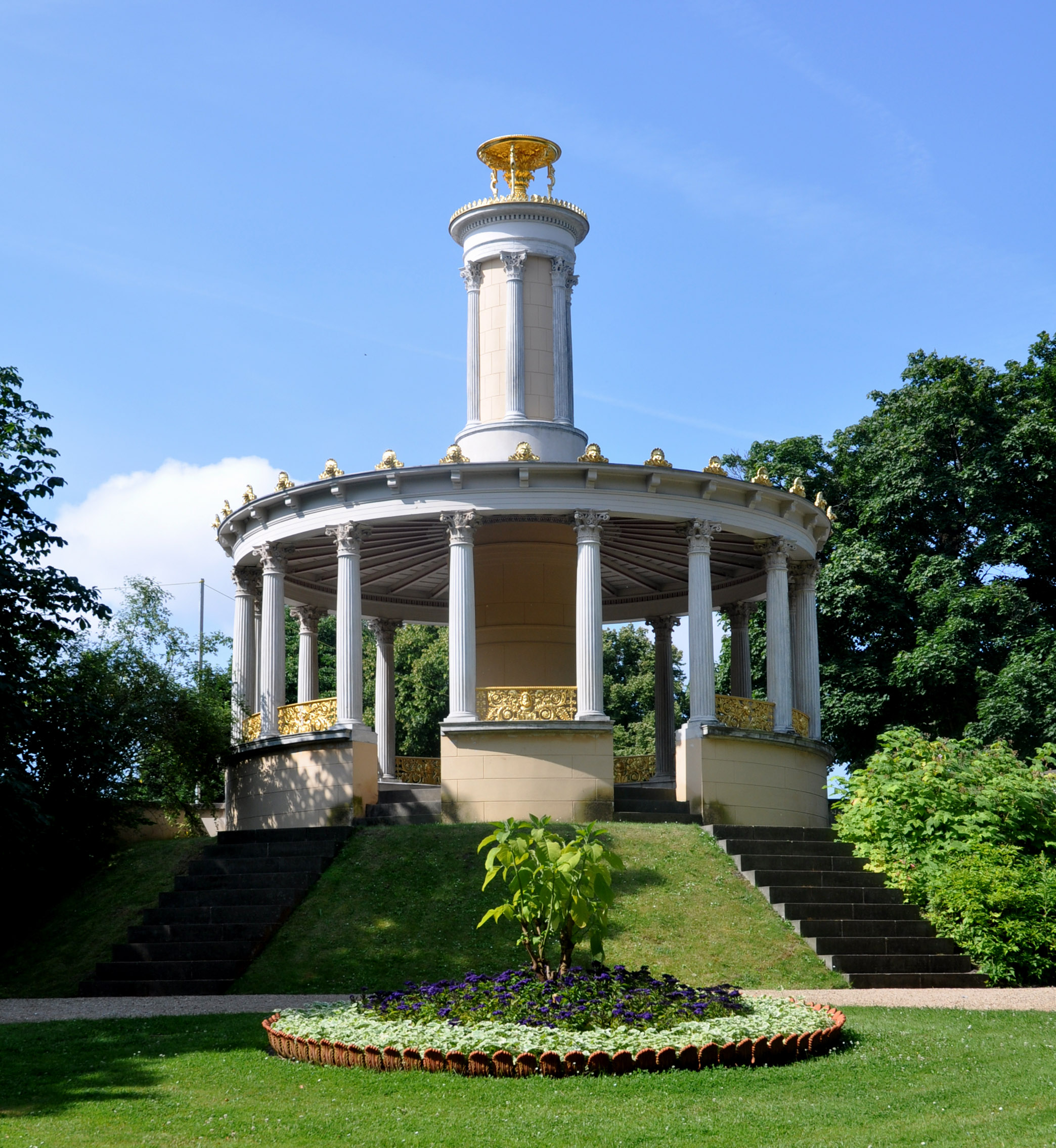 Die Gartenseite der Rotunde